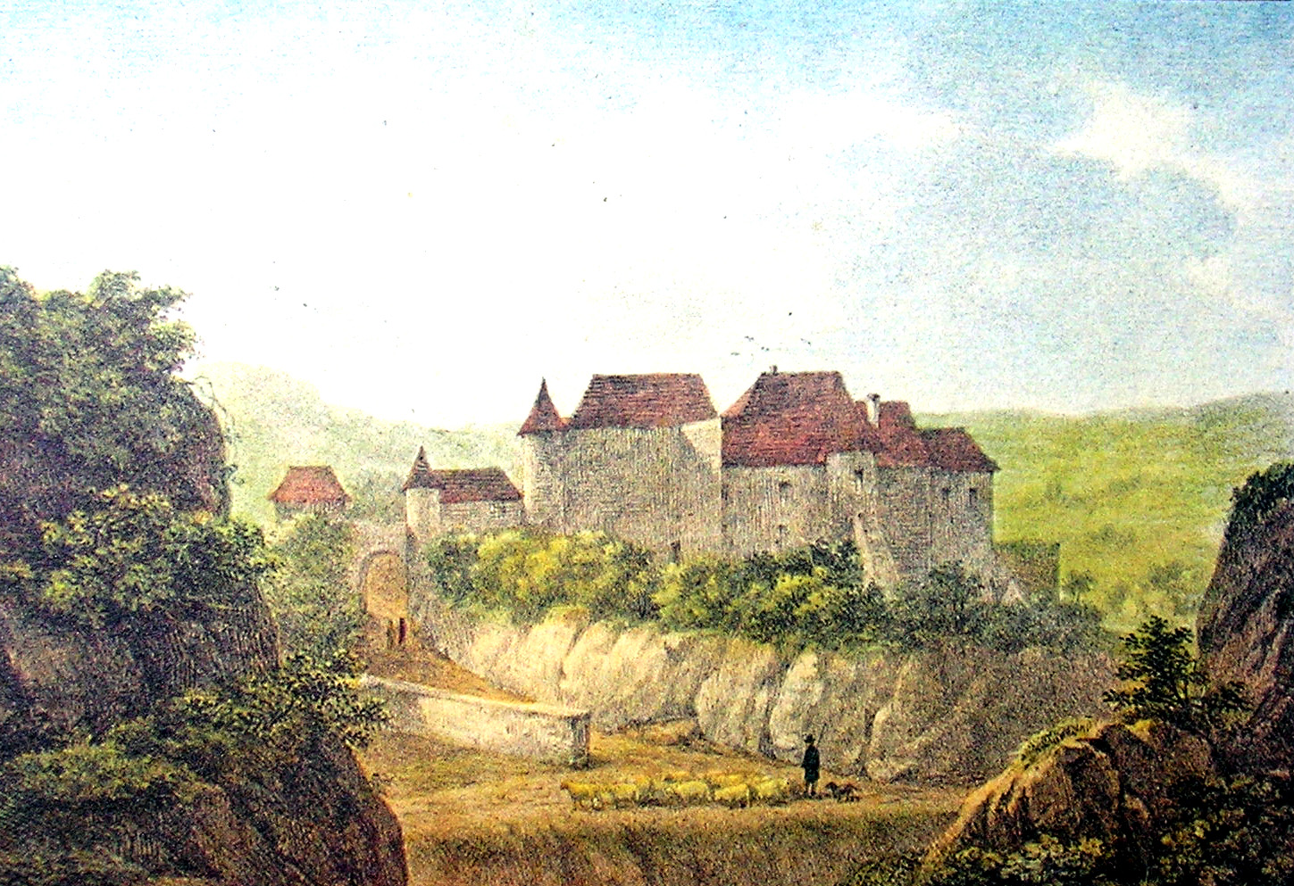 Jean-Baptiste Madou (1796-1877): Lithographie vun der Buerg vu Jonglënster